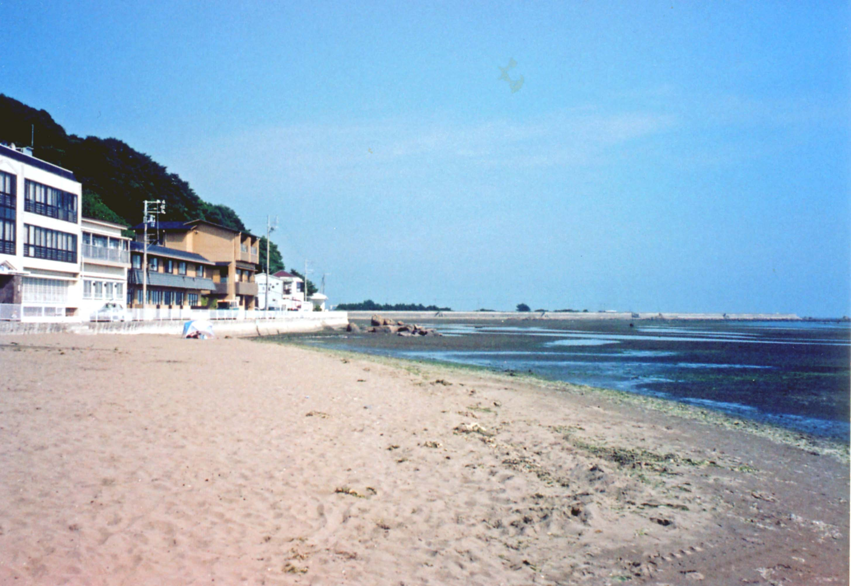 兵庫県たつの市新舞子海水浴場